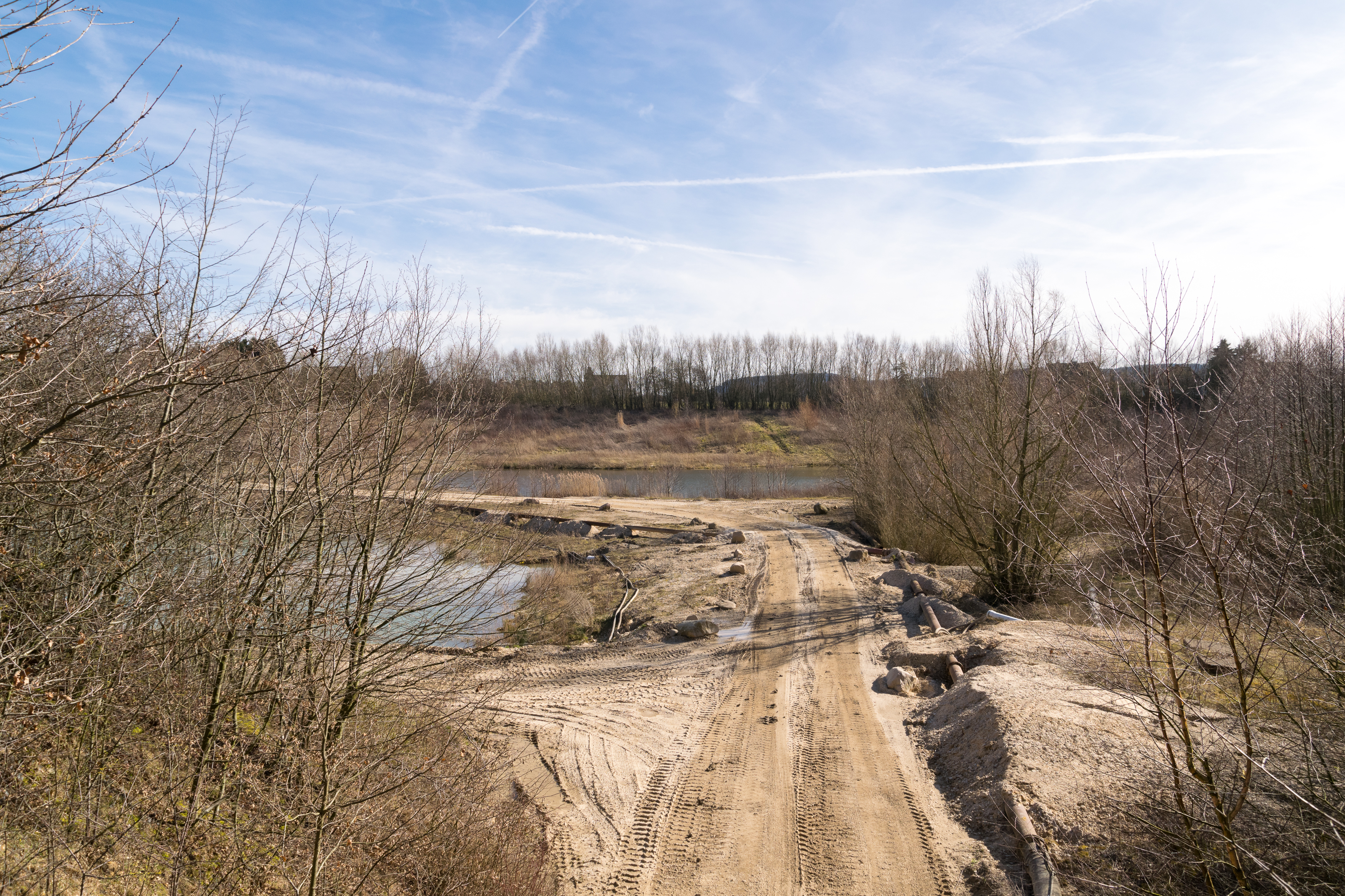 Naturschutzgebiet "Abgrabung Retlager Bach" mit aktuellen und ehemaligen Sandgruben, Lage, Kreis Lippe